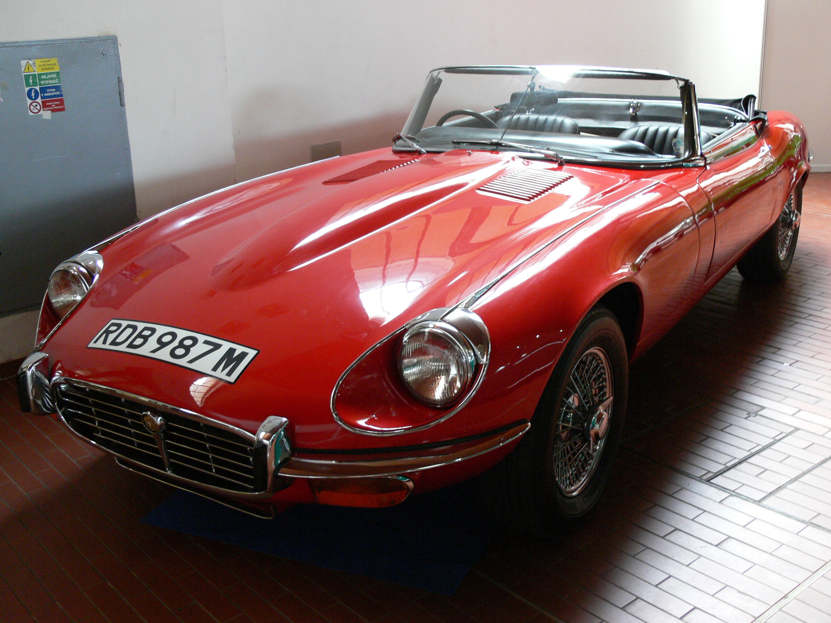 Jaguar E-type 2. série roadster, Veteran Motor Show